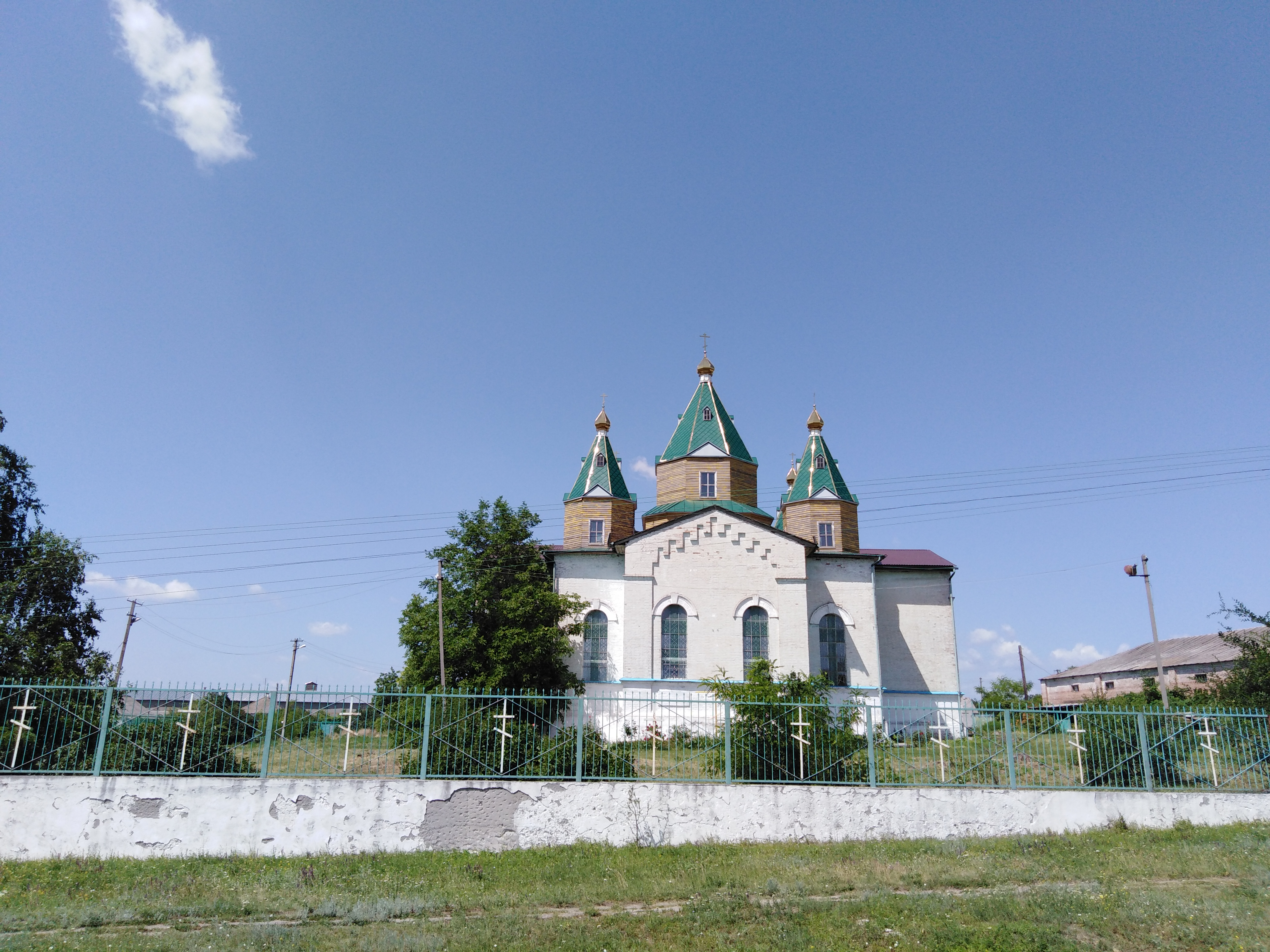 Україна. Дніпропетрівська область, Новомосковський район. Храм